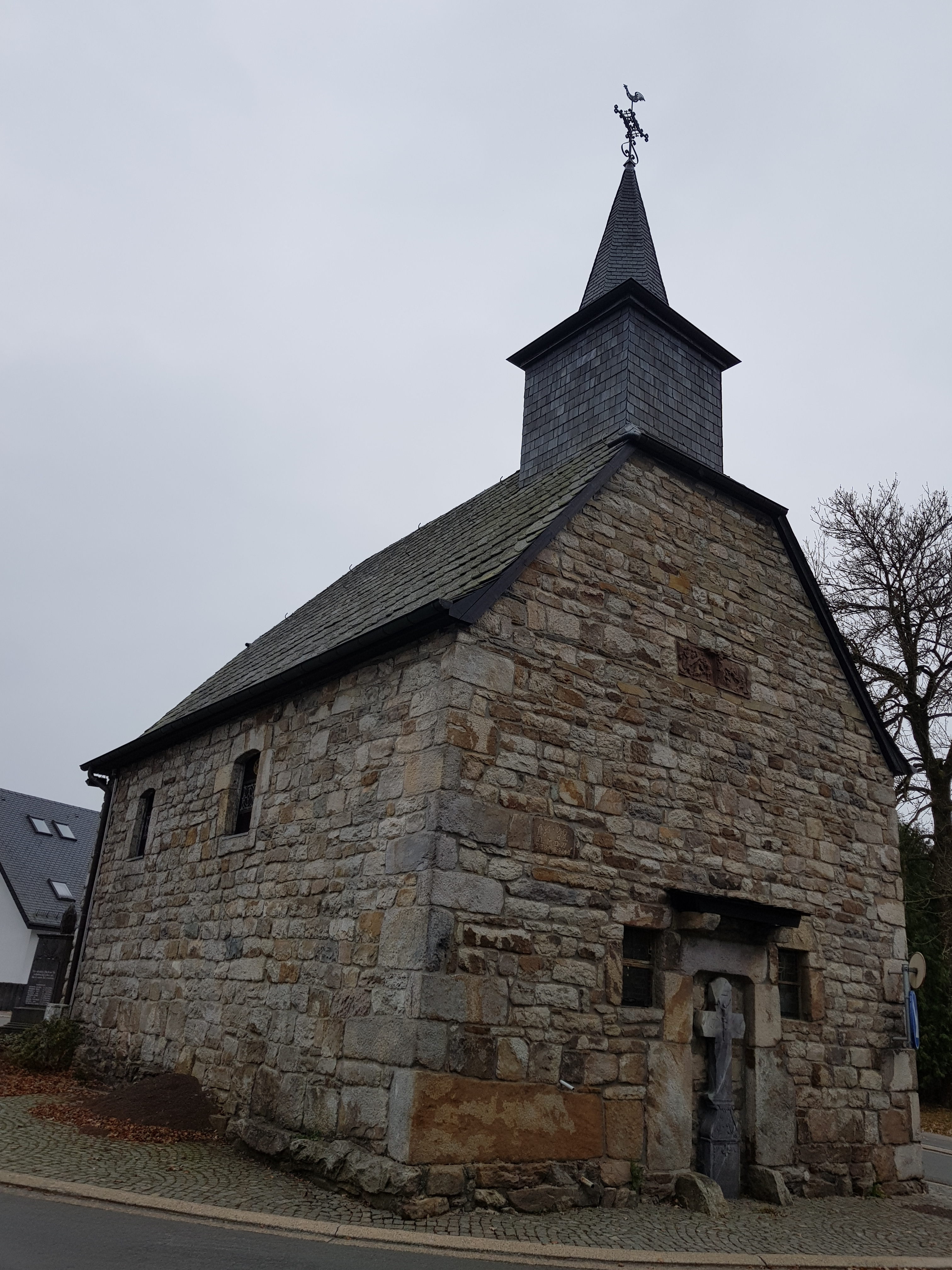 Kapelle St. Barbara, Iveldingen, Amel, Belgien This photo of immovable heritage has been taken in the Walloon Region